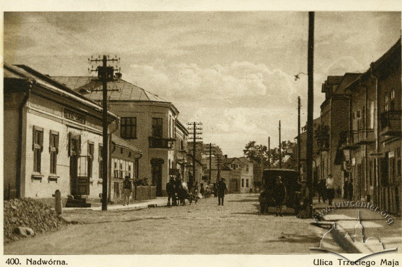 Вулиця Третього мая, 1929